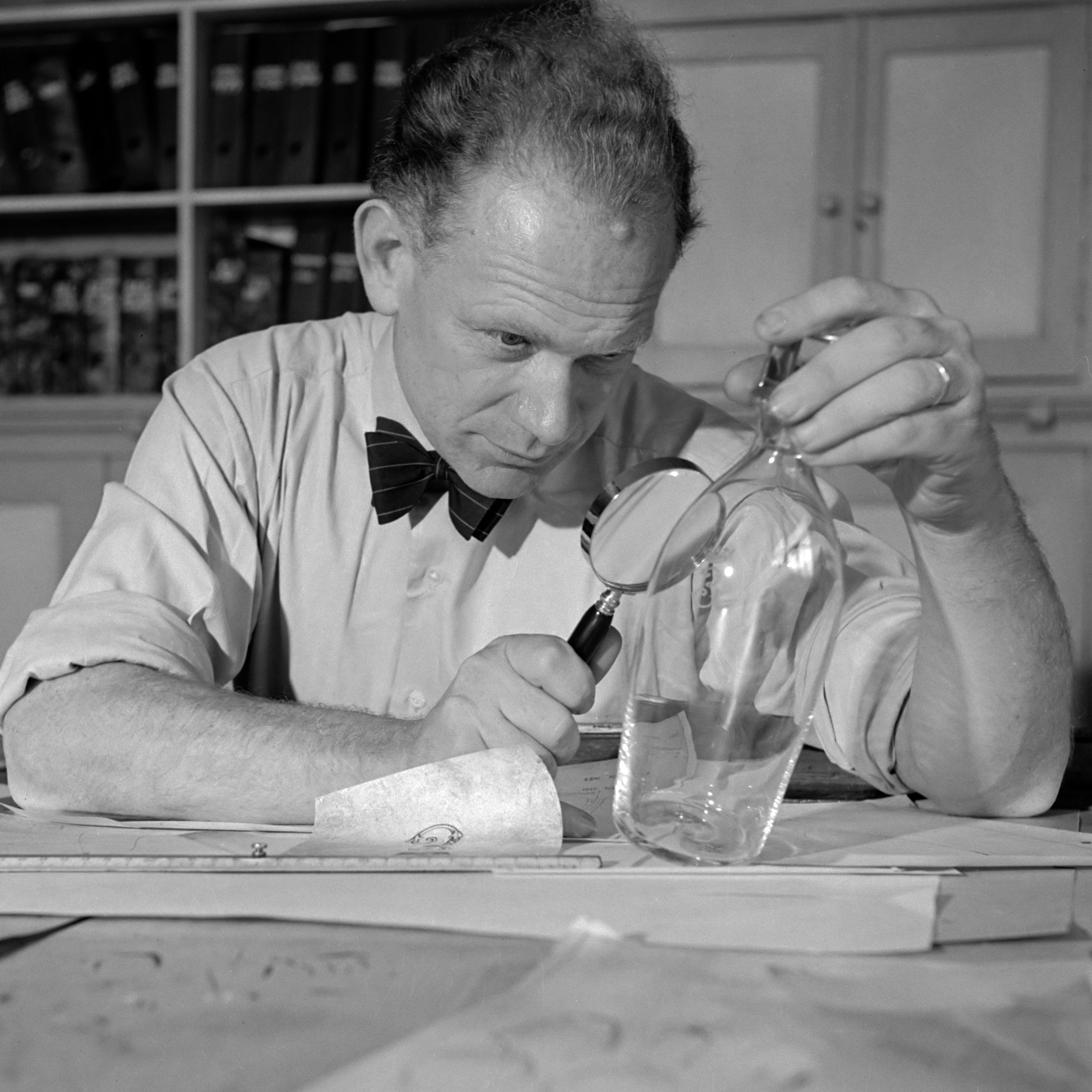 Glasfabriek Leerdam. De glasontwerper Andries Copier controleert in de Glasfabriek Leerdam een fles 1937